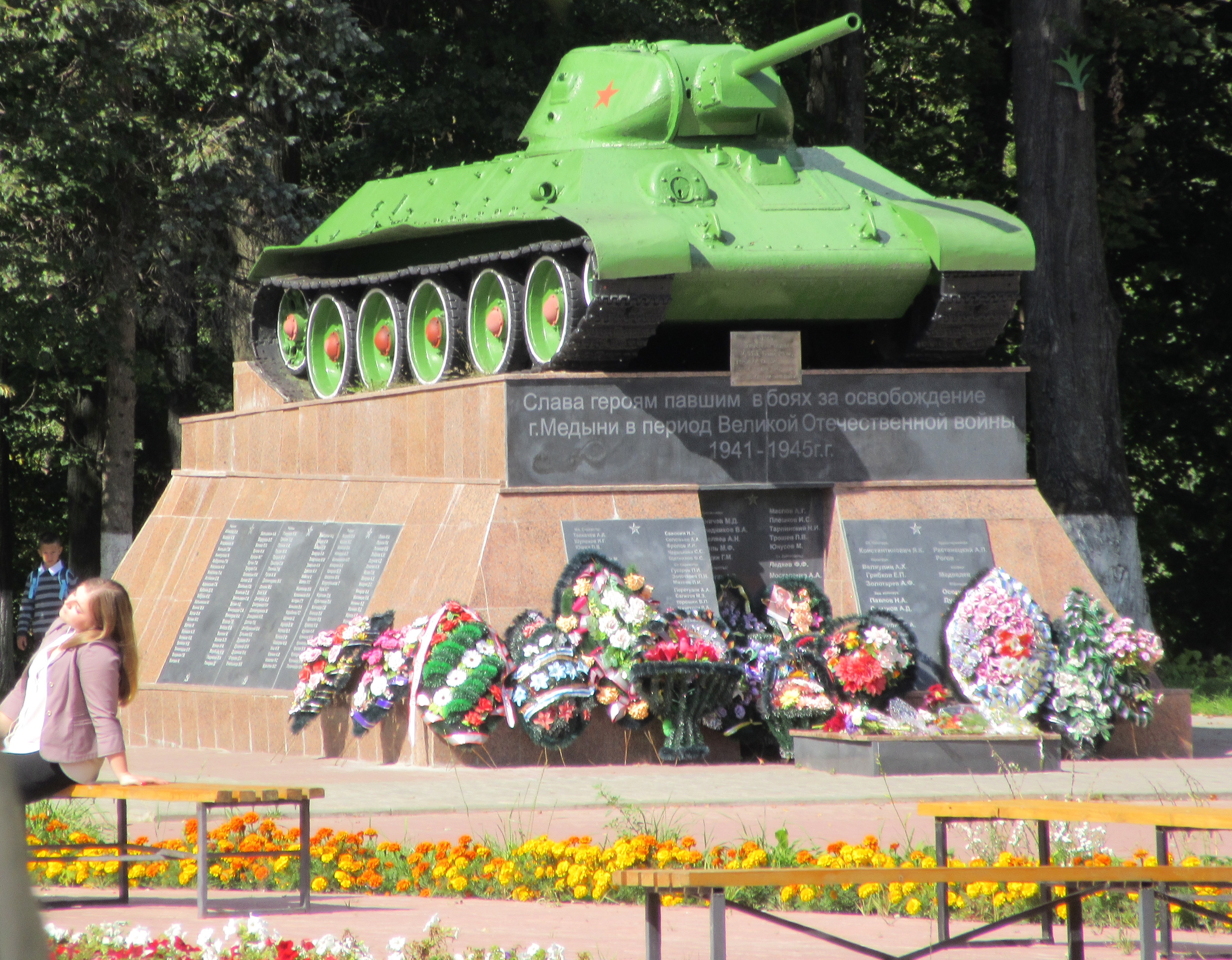 Братская могила: Центр, около райисполкома, Медынь, Медынский район, Калужская область